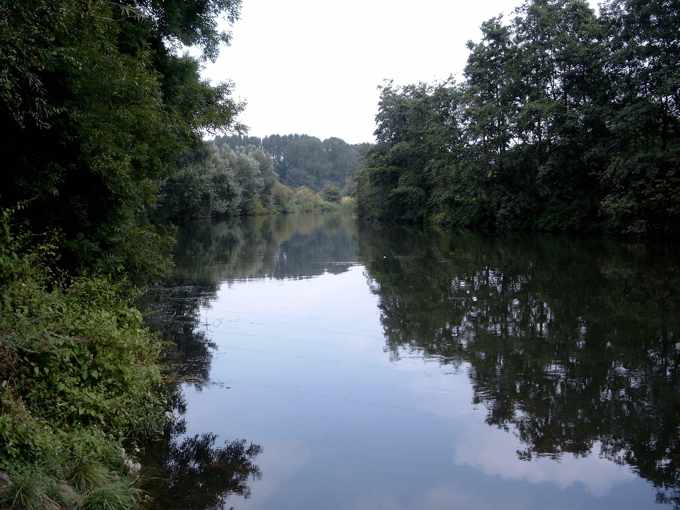 Lippe-Panorama in Lünen im Naturschutzgebiet „Lippeaue von Lünen bis Schleuse Horst“ (NSG UN-053) südwestlich von Lünen-Alstedde und nordwestlich vom Kraftwerk Lünen; Blick flussaufwärts